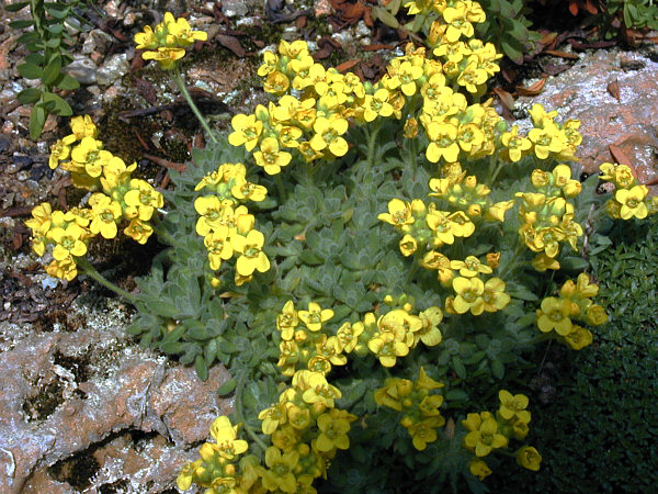 Syn. D. calycosa. Drave en coussin de 3 à 4 cm endémique de la Turquie qui pousse sur crevasses et étendues rocheuses entre 2400 et 2900 m. (photo en culture)